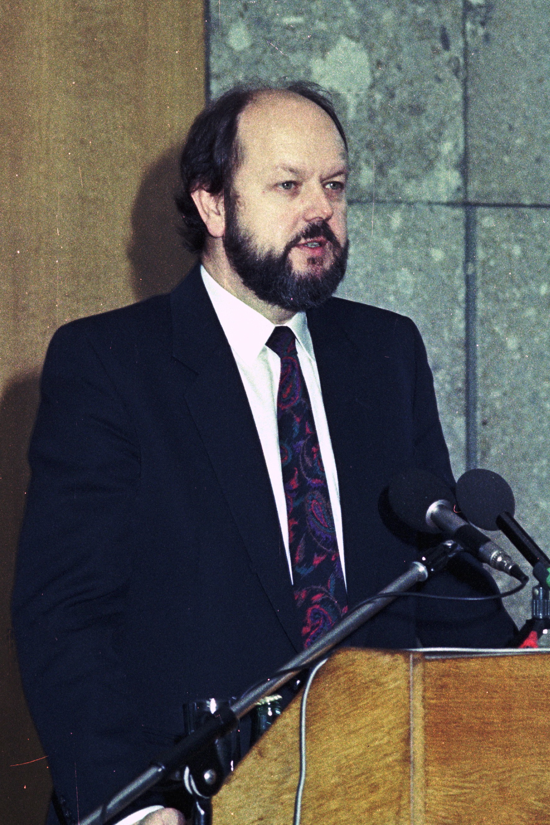 Prof. Dr. Diether Breitenbach, Kultusminister des Saarlandes, auf einer Festveranstaltung des Saarländischen Kulturkreises zu dessen 25-jährigen Bestehen.